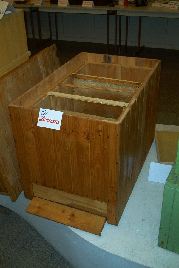 Úl ležan jsem vyfotil 15.10.2002 v Holešově na akci Sto let včelařského spolku Holešov. Focený úl je v mém osobním vlastnictví.